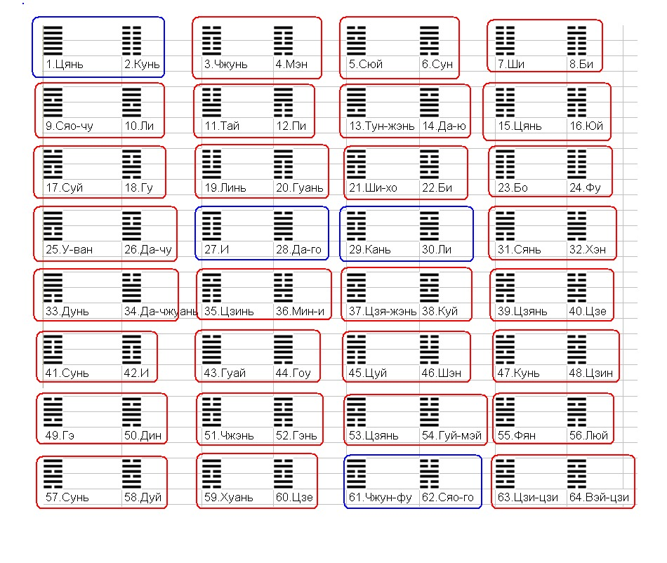 Последовательность Вэнь Вана, разбитая на пары.